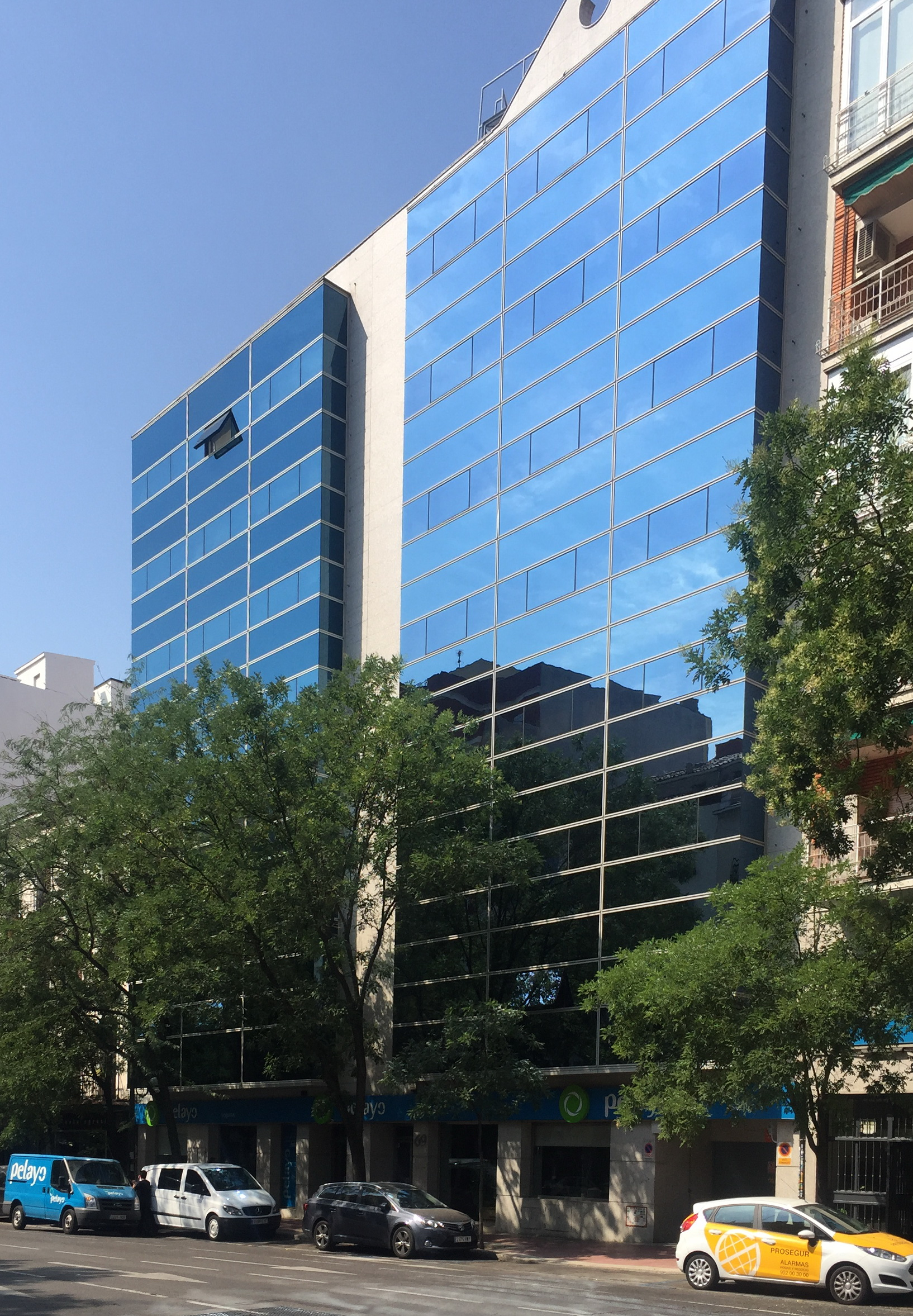 Oficinas del Grupo Pelayo situadas en la calle Santa Engracia 67-69 de Madrid.